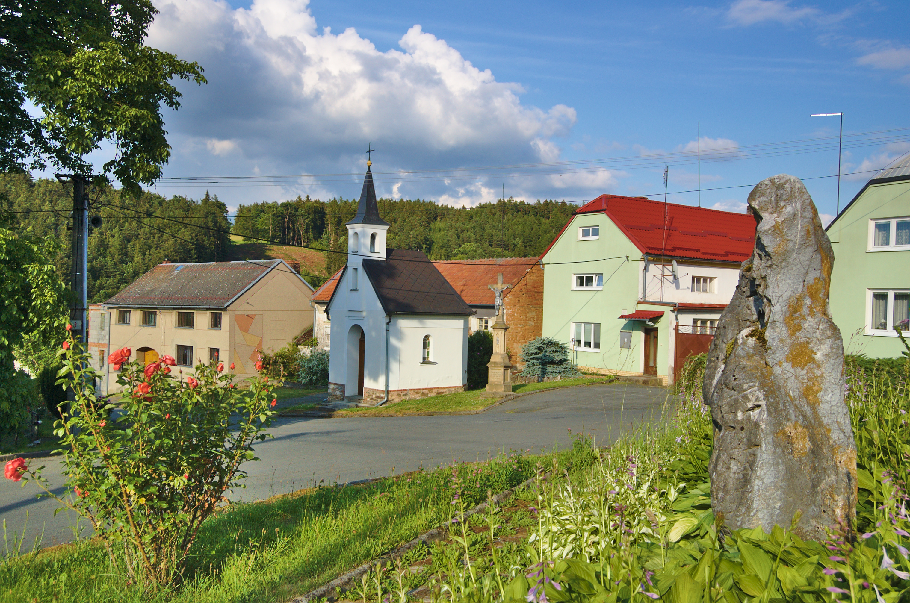 Náves, Veselíčko, Luká, okres Olomouc